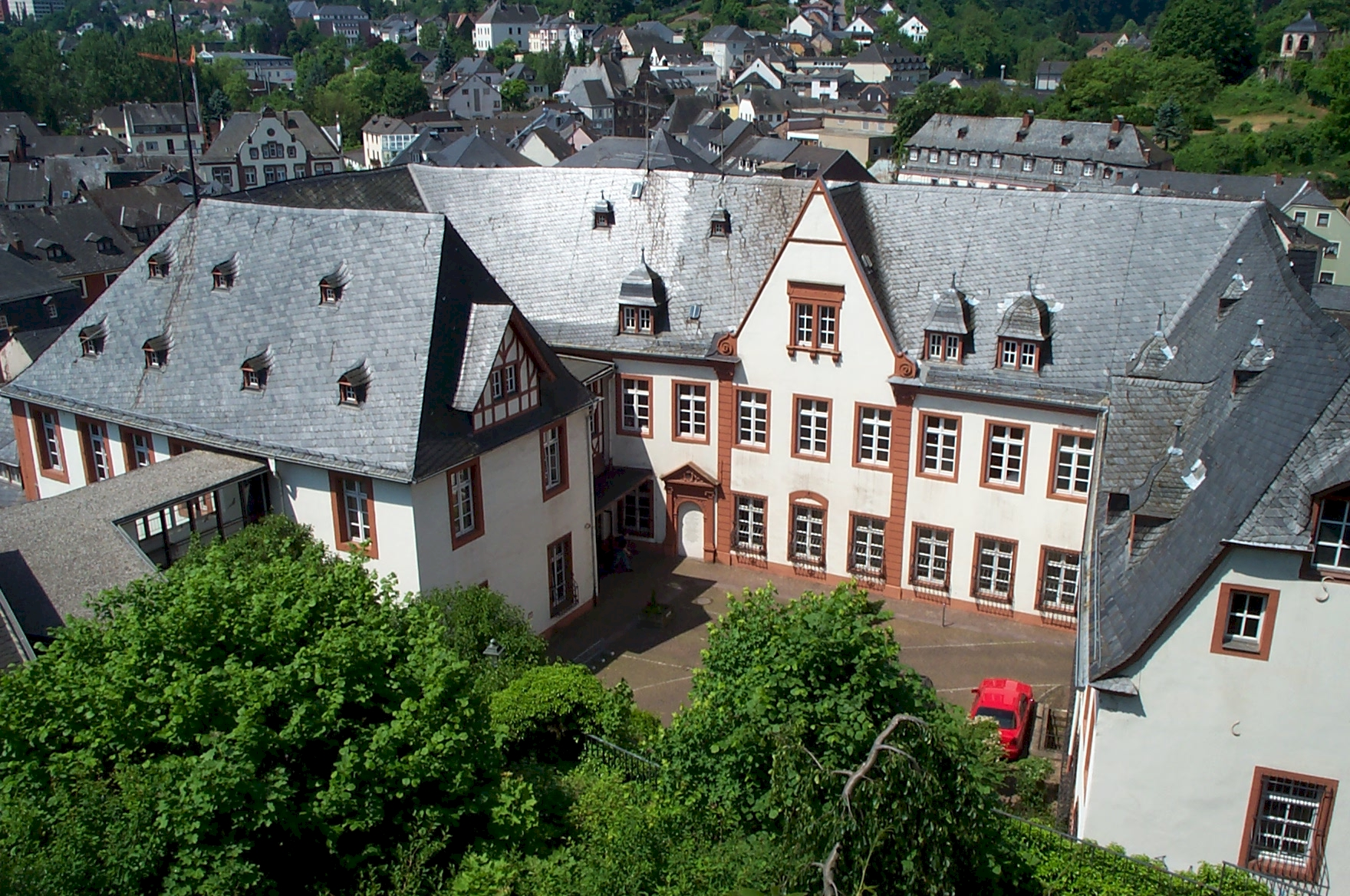 Haus Warsberg - Sitz der Verbandsgemeindeverwaltung Saarburg